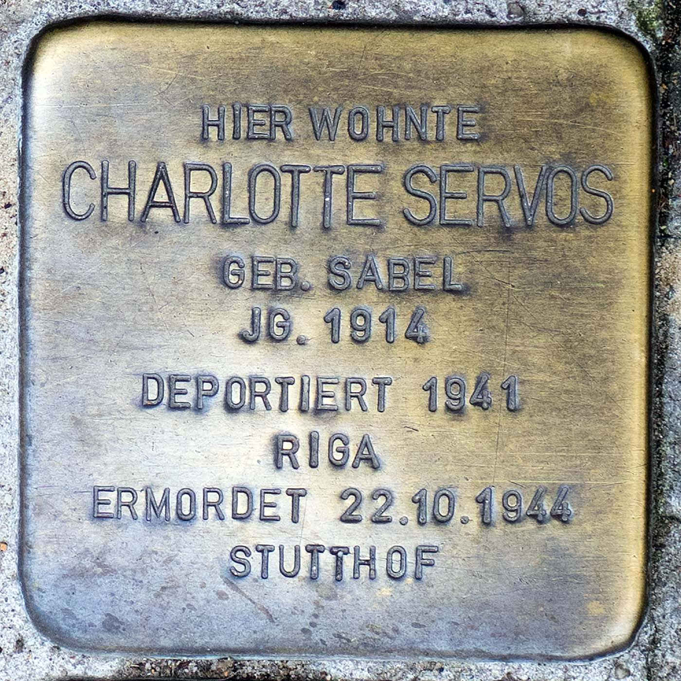 Stolperstein für Charlotte Servos (Willich)